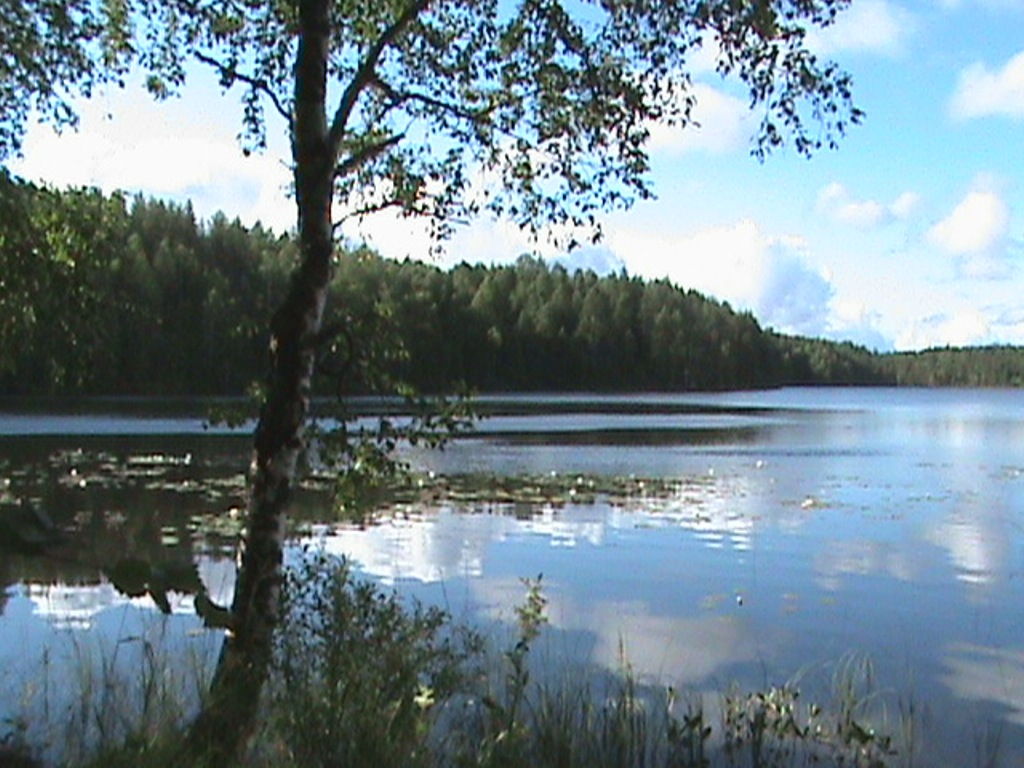 Маккозенъярви